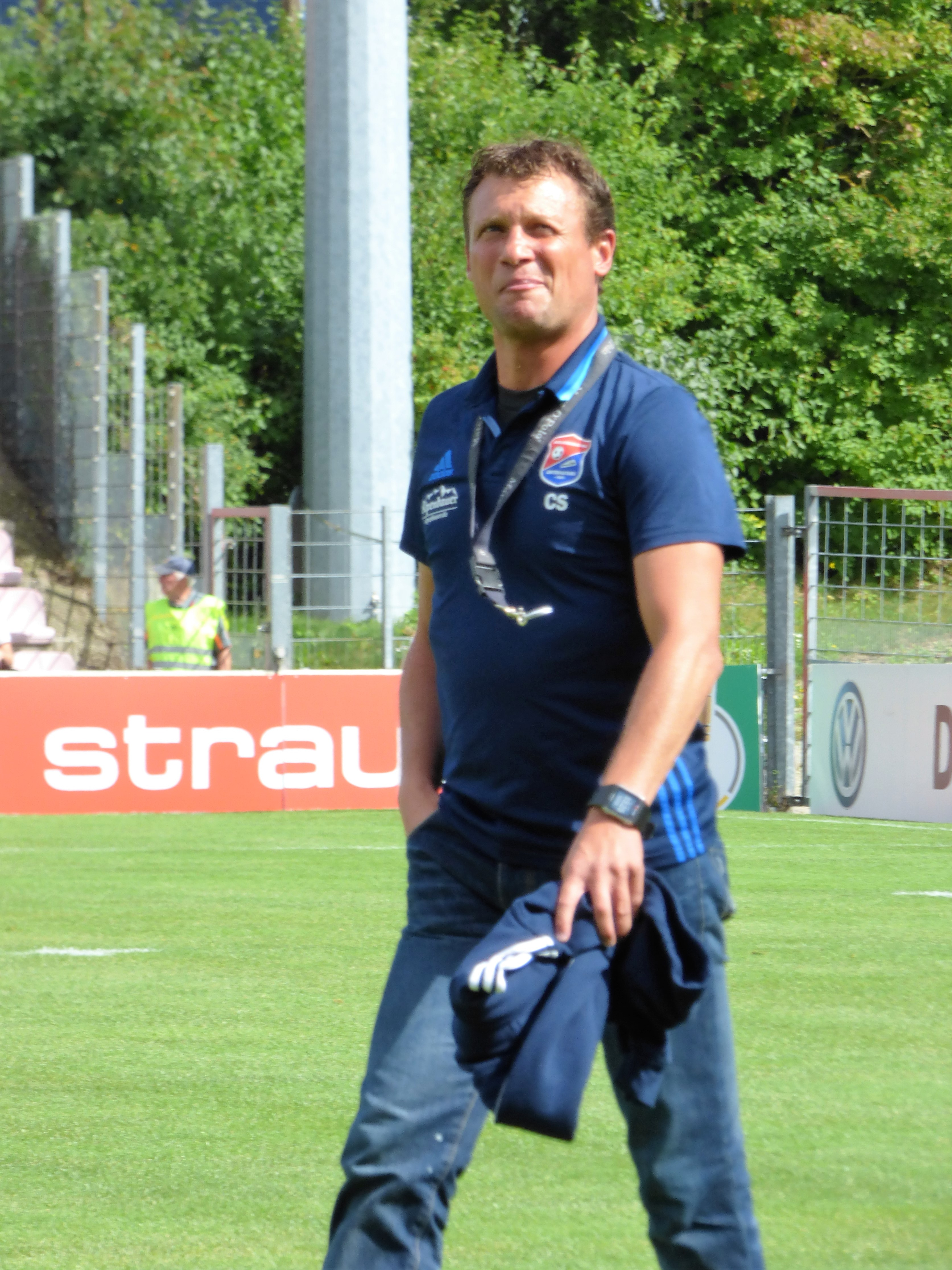 Schromm, Claus Trainer Unterhaching